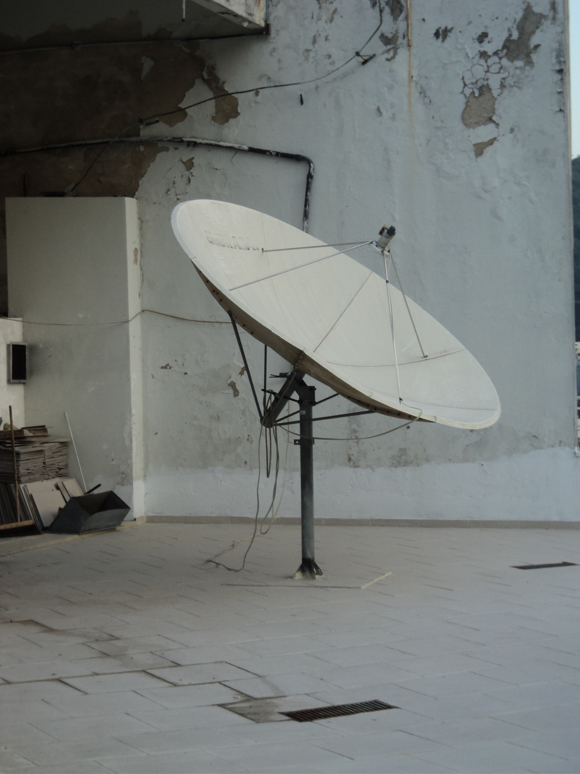 Antena parabolica de foco centrado